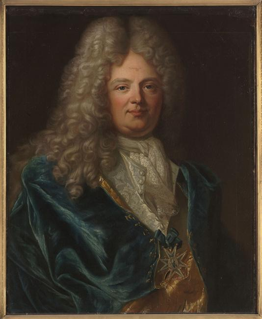 Nicolas Mesnager (1658-1714), ambassadeur plénipotentiaire au congrès d'Utrecht